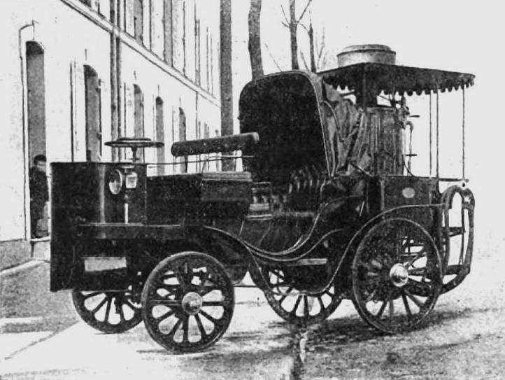 'La Mancelle', d'Amédée Bollet (1878)